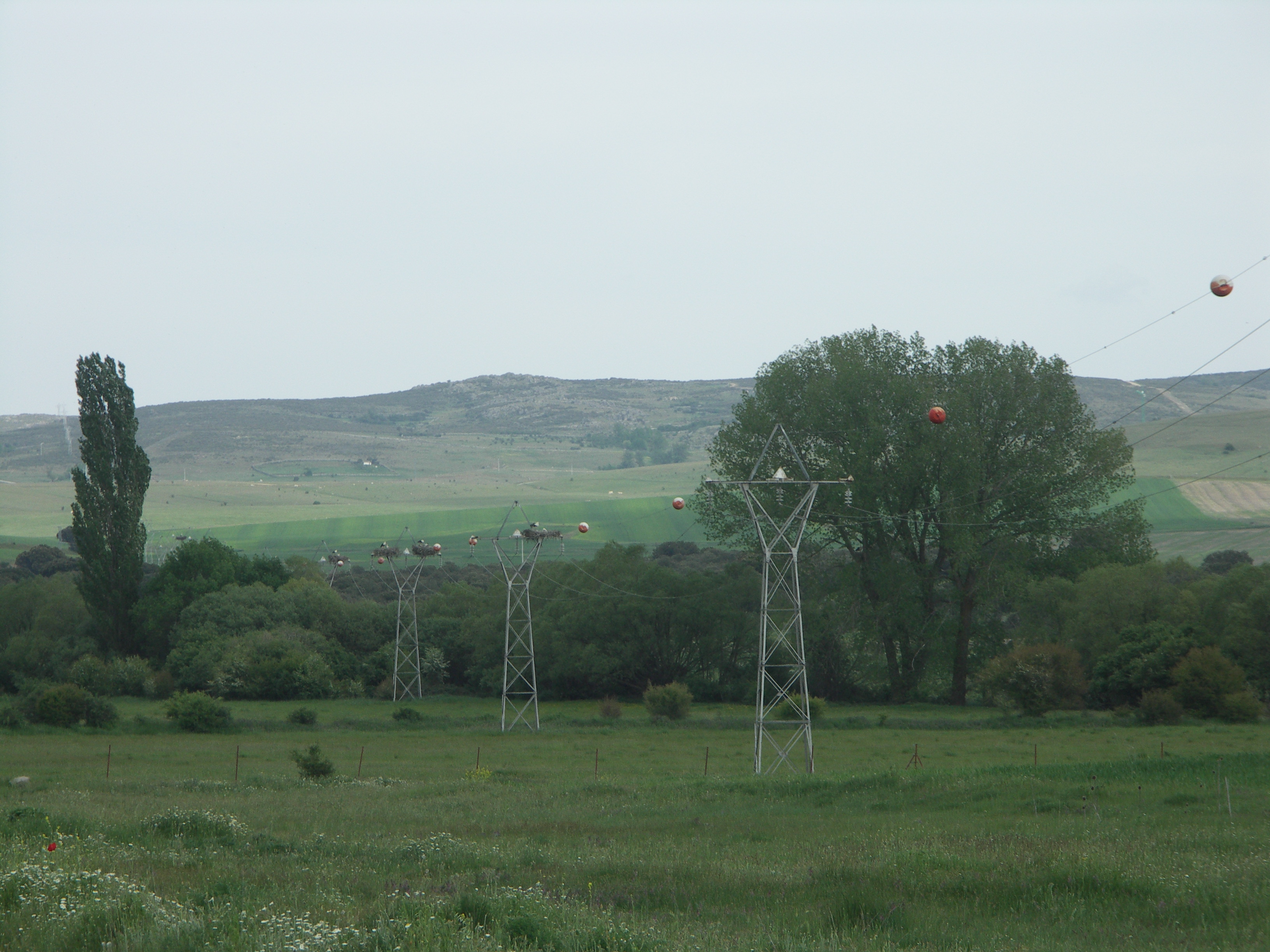 Valle de Amblés en la rivera del río Chico (Ávila, España)